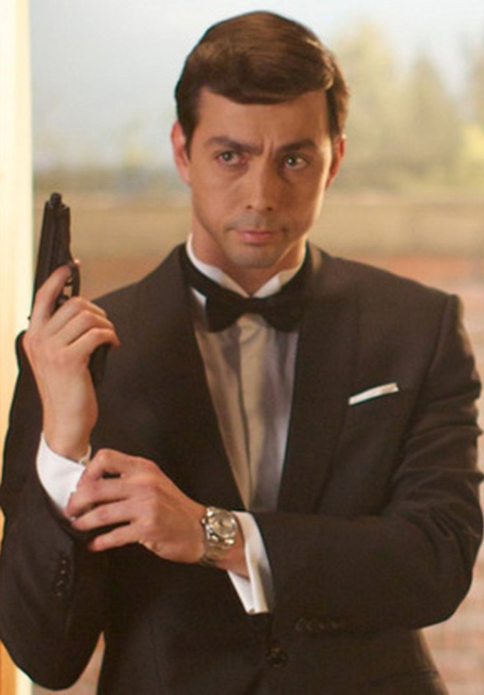 Sliku ustupio Aleksandar Filimonovic za wikistranicu.